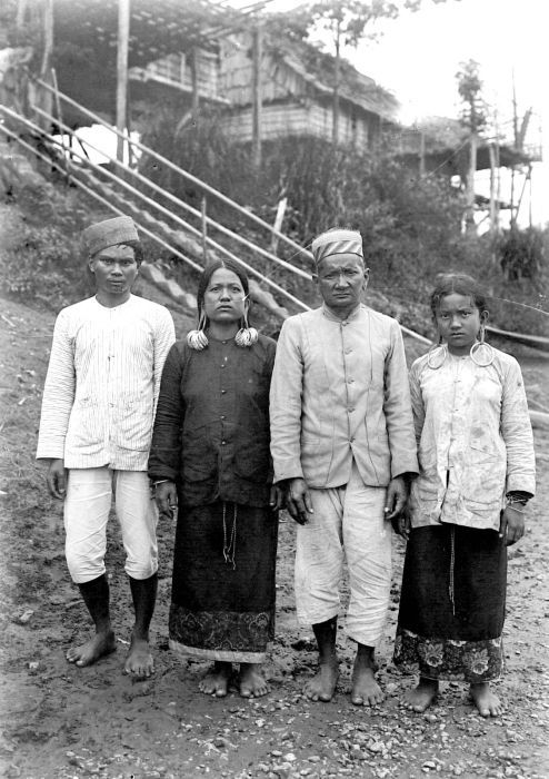 Negatief. Hoofd van Long Tesak met zijn familie in Kutai, Borneo